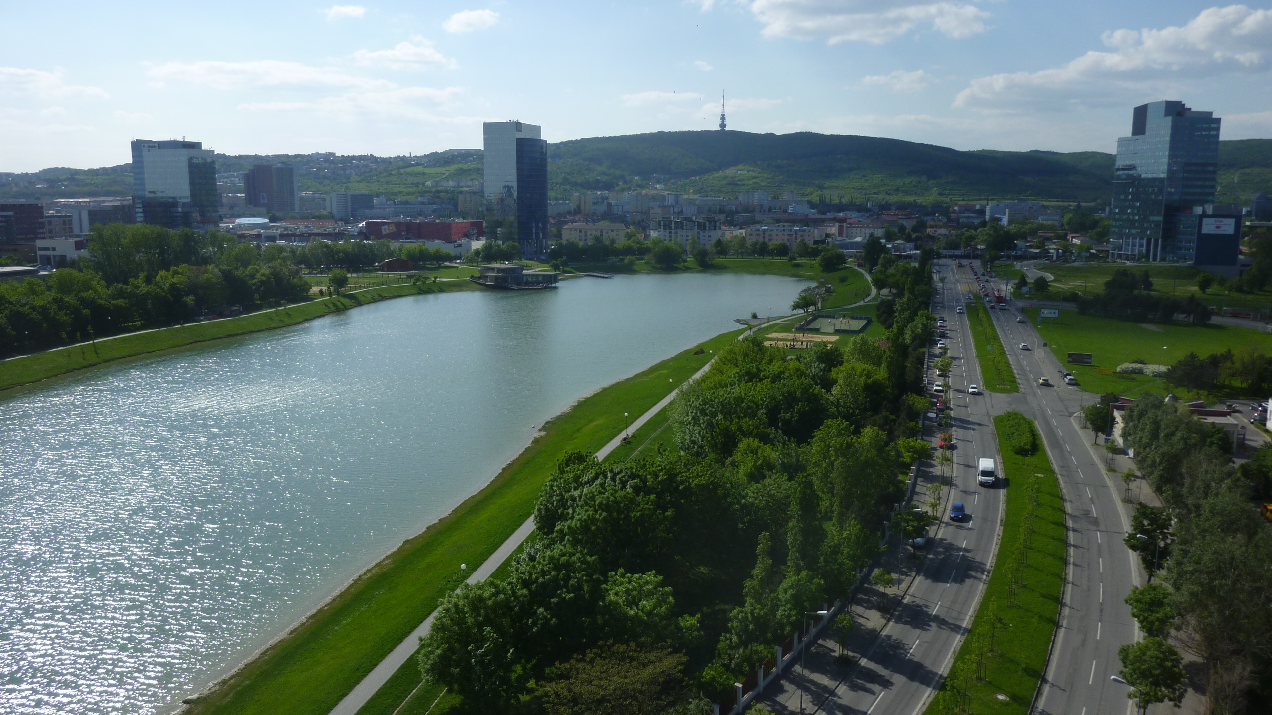 KUCHAJDA Z KOLOSEA